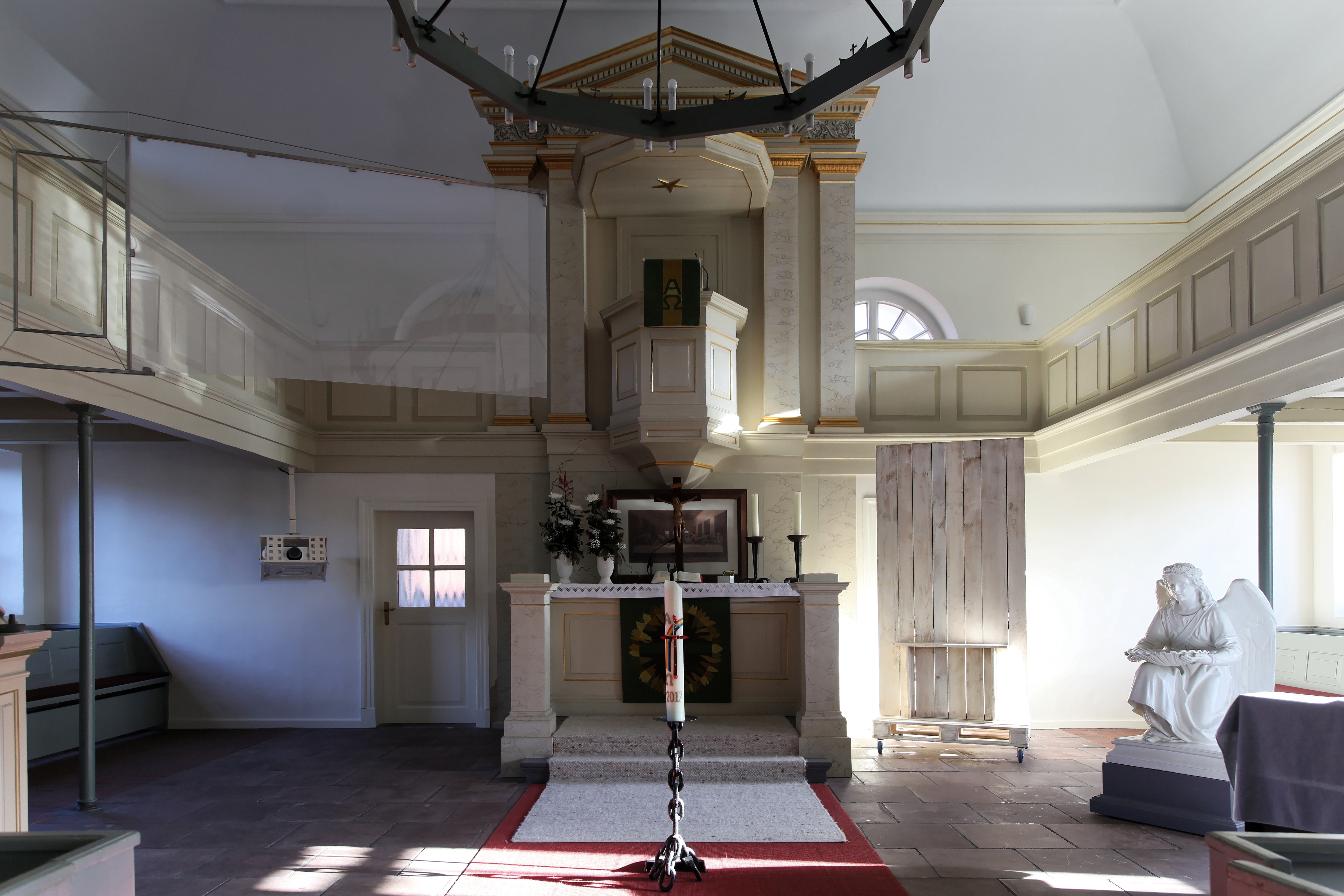 Hoffnungskirche, Untenende in Rhauderfehn